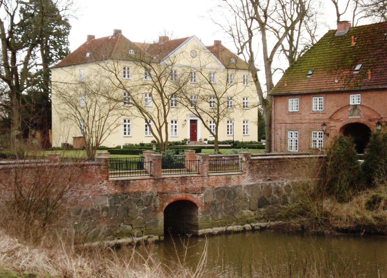 Gut Sierhagen - Haupthaus; Architekt Alexis de Chateauneuf (* 18. Februar 1799 in Hamburg; † 31. Dezember 1853 ebenda).